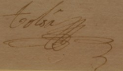 Nombre: Firma_de_Tolsá Fotografió: Carlos Martínez Blando (2005) Otra información: Firma que aparece en un boceto para un candelero. Se encuentran el museo Manuel Tolsá en el Palacio de Minería. Tomado con una cámara Canon Digital Rebel XT. Editado con Photostudio 5.5 (tamaño)